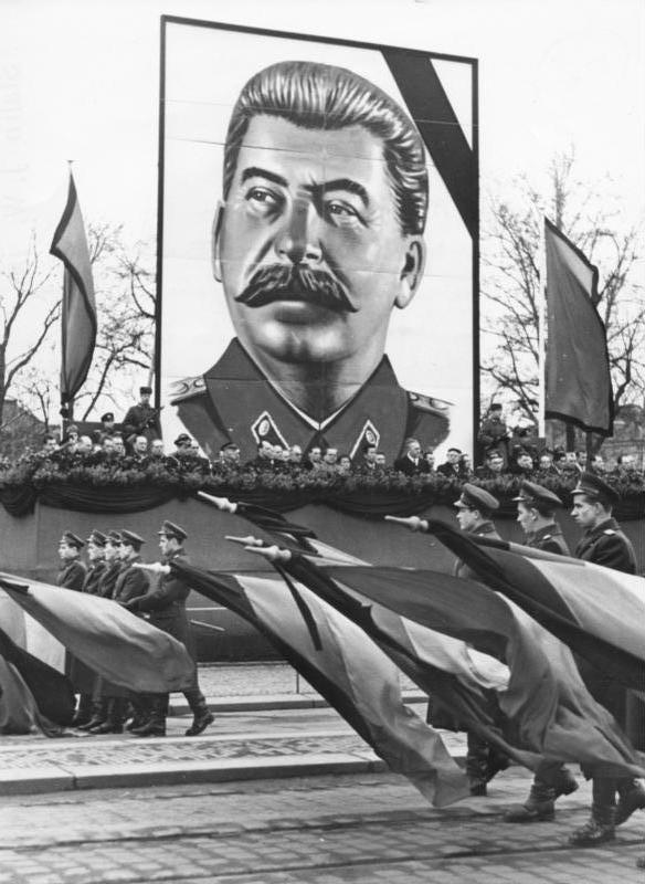 Zentralbild Höhne-Pohl, 10.03.1953 Zum Tode J.W. Stalins 200.000 Dresdner Einwohner marschierten am 9.3.1953 schweigend am Bildnis Stalins am Ehrenmal der Sowjetarmee auf dem Platz der Einheit vorüber. UBz: Angehörige der kasernierten Volkspolizei senken ihre Fahnen. Die KVP Bezirk Dresden verneigt ihre Fahnen vor dem Bildnis des unvergeßlichen Stalin, beim Trauermarsch der 200.000 Dresdner am Nachmittag des Beisetzungstages.